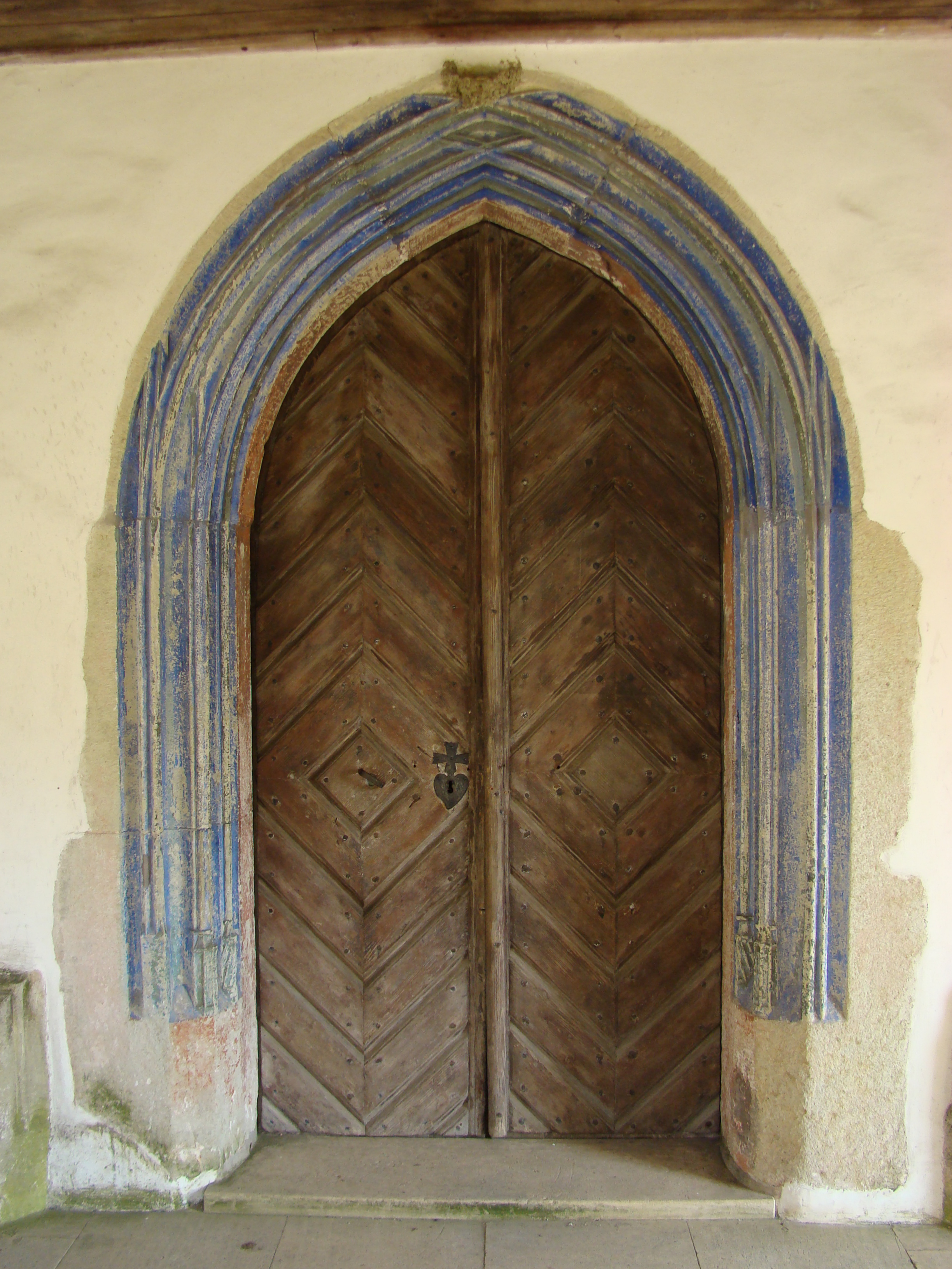 Biserica "Adormirea Maicii Domnului" a mănăstirii Vadului , sat Vad, județul Cluj